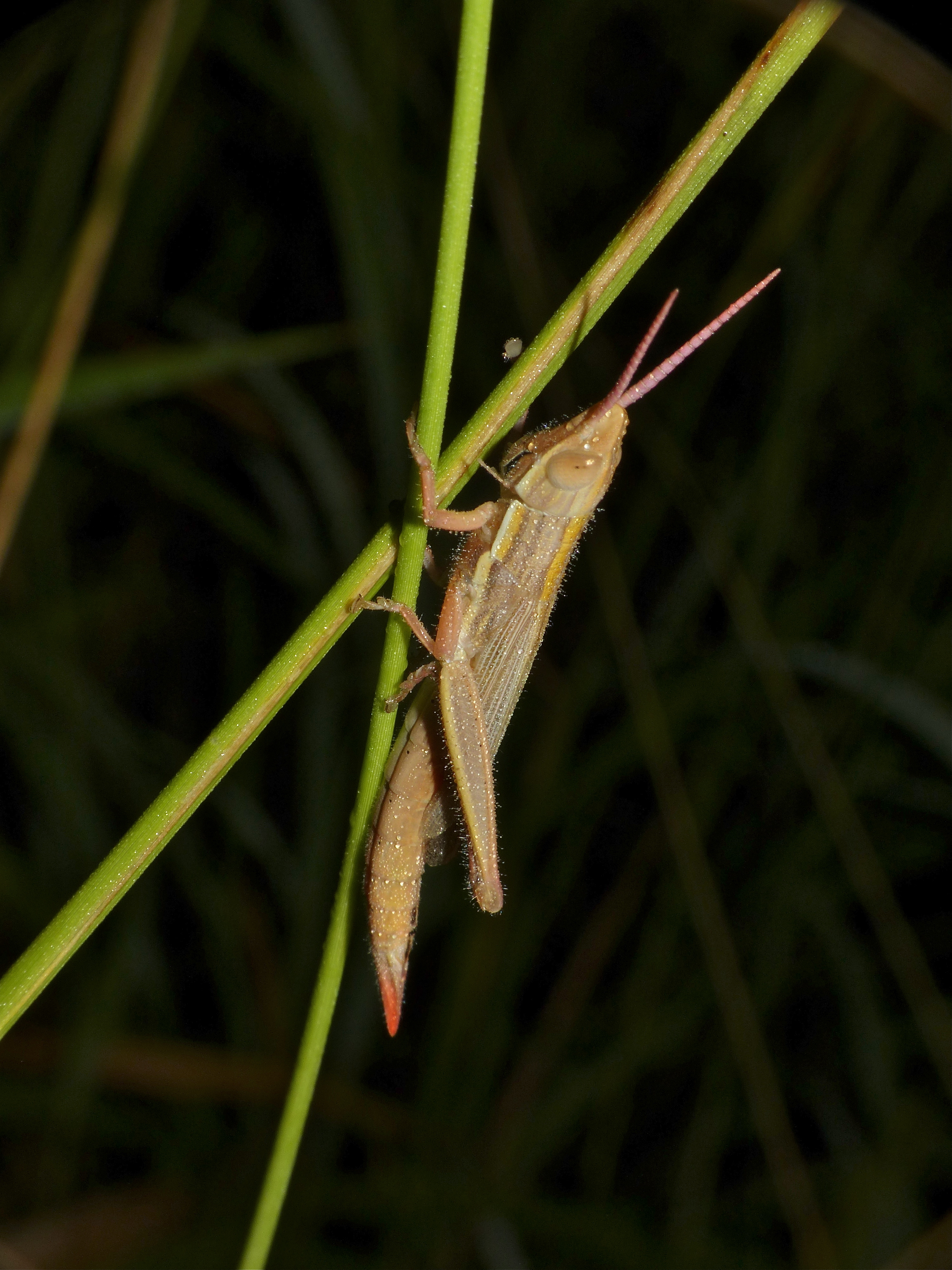 Lower Sabie Camp, Kruger NP, SOUTH AFRICA